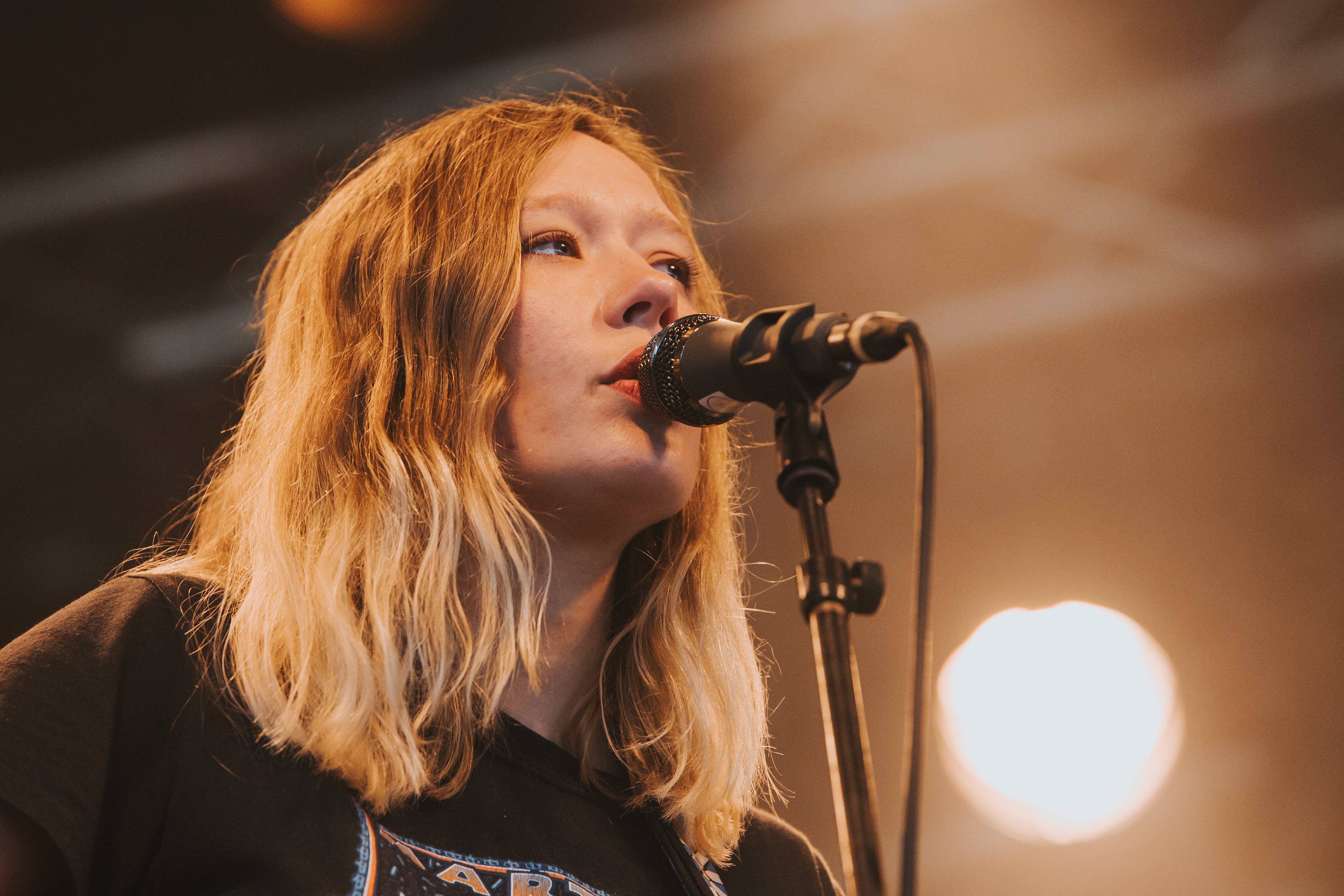 Photo: Krists Luhaers // @Kristsll